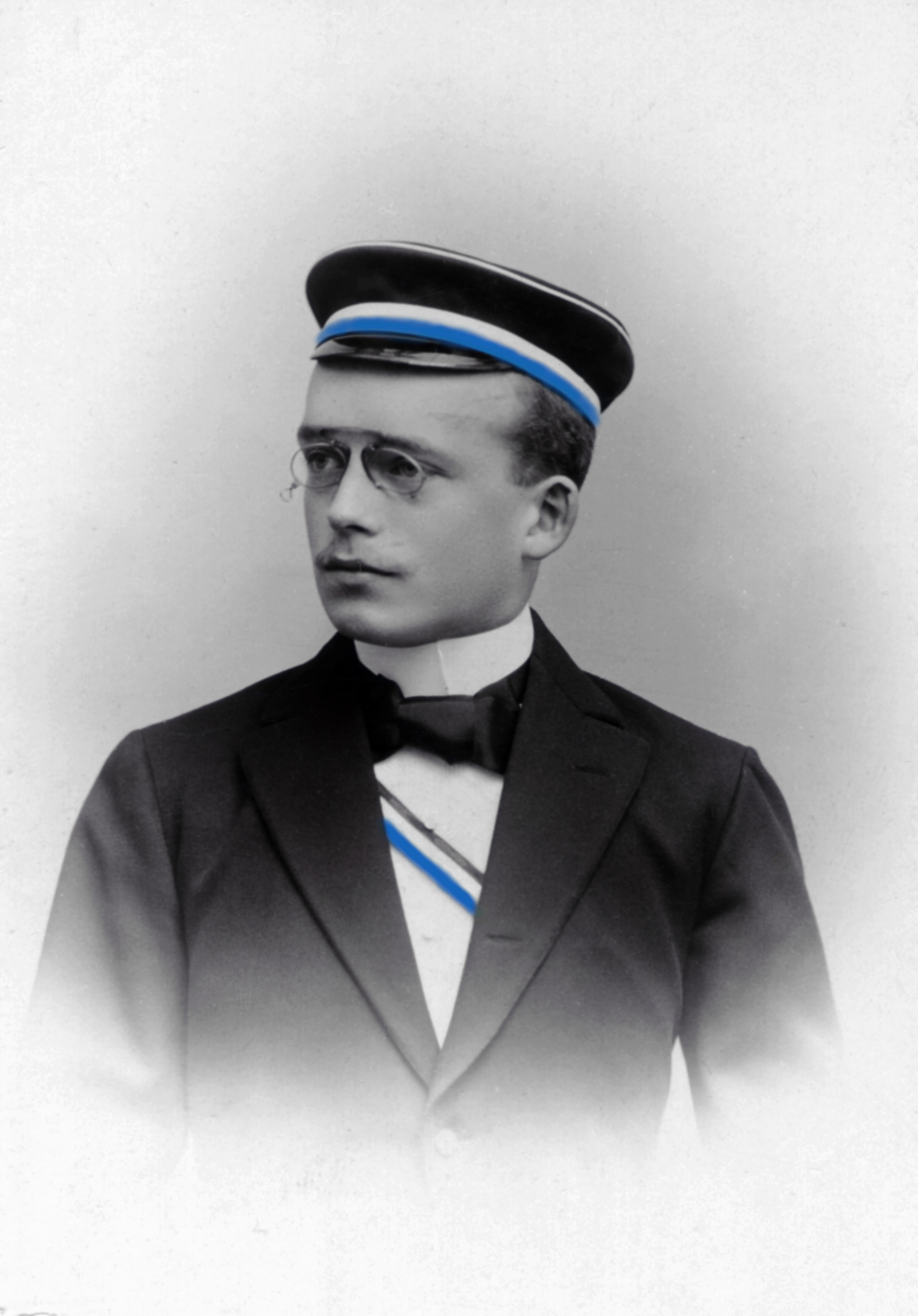 Fotografie von Wilhelm Crull als Corpsbursche der Suevia München